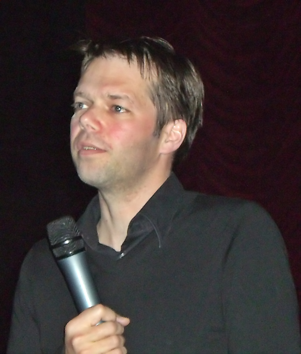 Hans-Christian Schmid @ the Gartenbaukino in Vienna